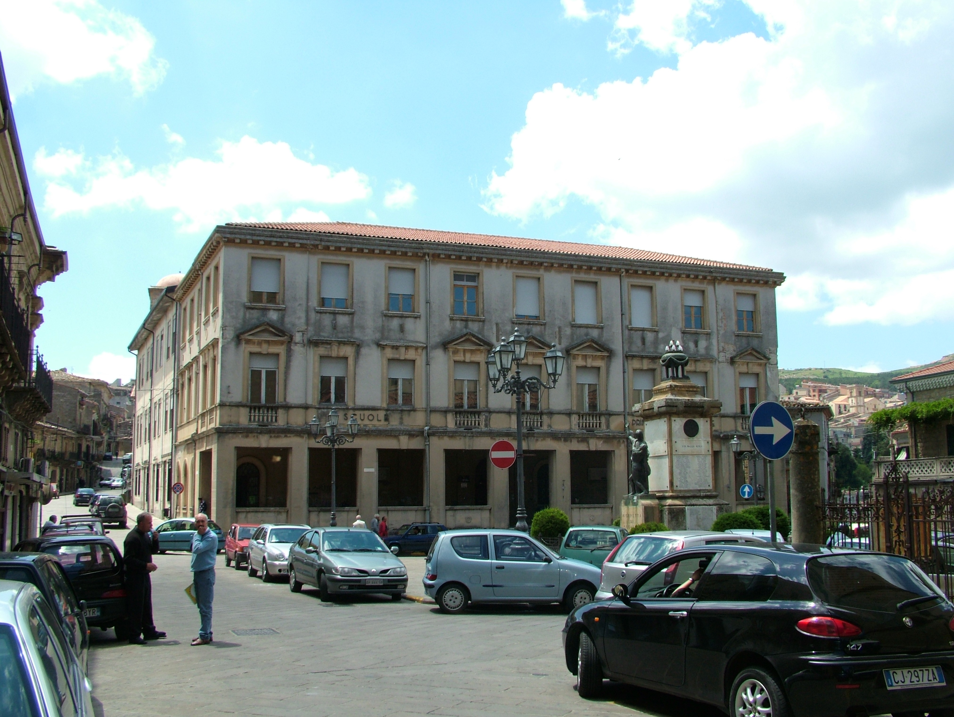 Mistretta, Provinz Messina, Sizilien, die Schule